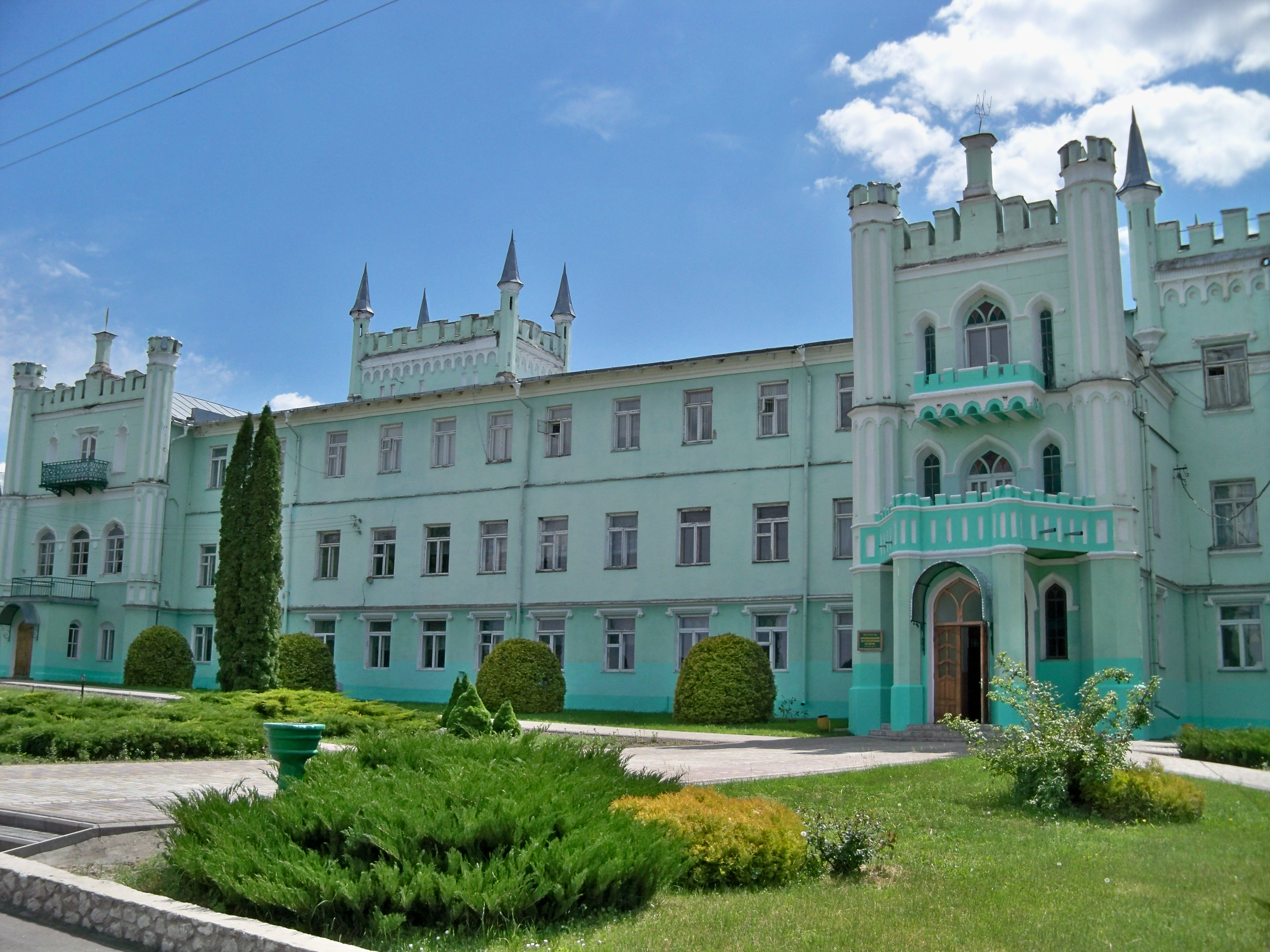 Палац, Кременецький район, с. Білокриниця, садиба Кременецького лісотихнічного коледжу